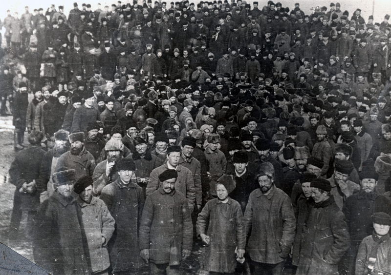 Рабочие - участники митинга на Пермских пушечных заводах в декабре 1905 года; Рабочие - участники митинга. 1905. ГАПК. Ф. 952. Оп. 1. Д. 384.